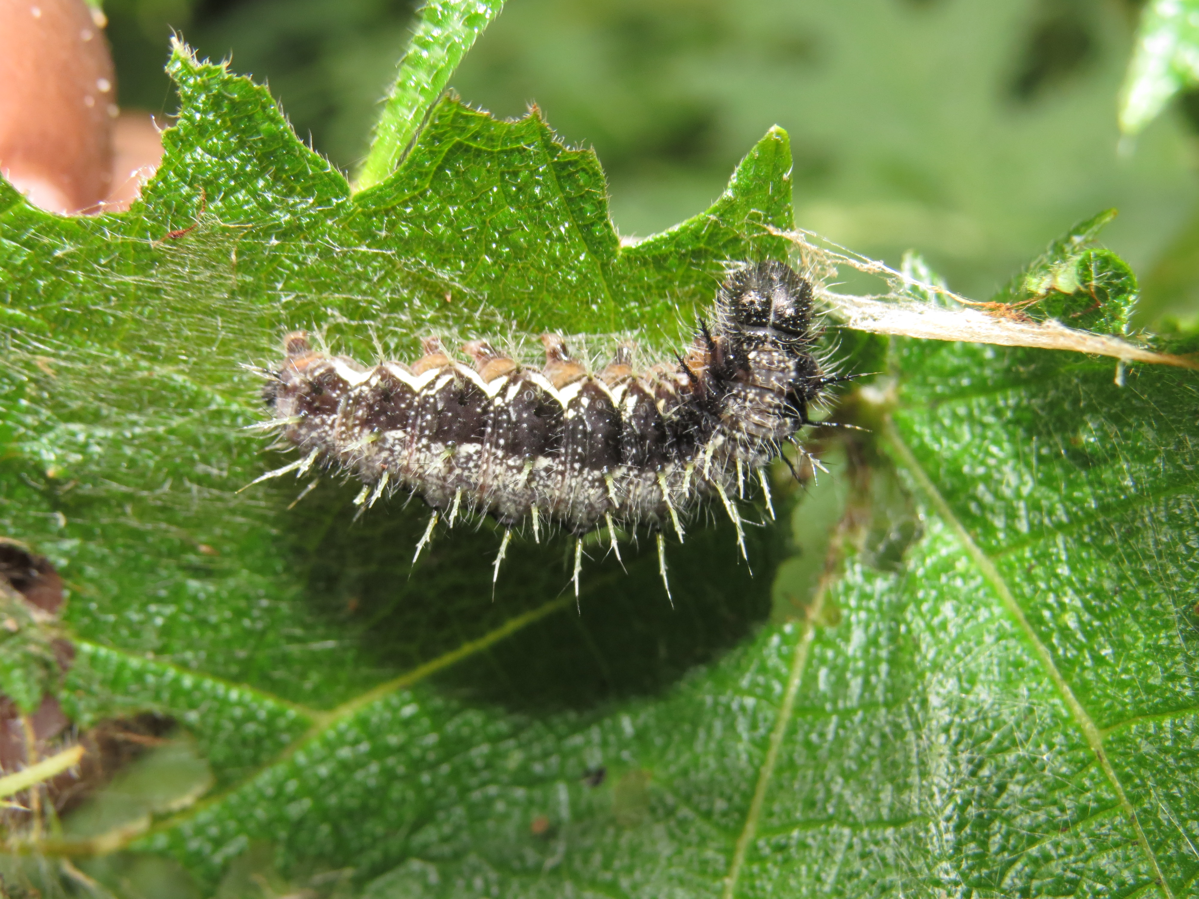 Photos taken at Mannavan Shola, Anamudi Shola National Park, Kerala